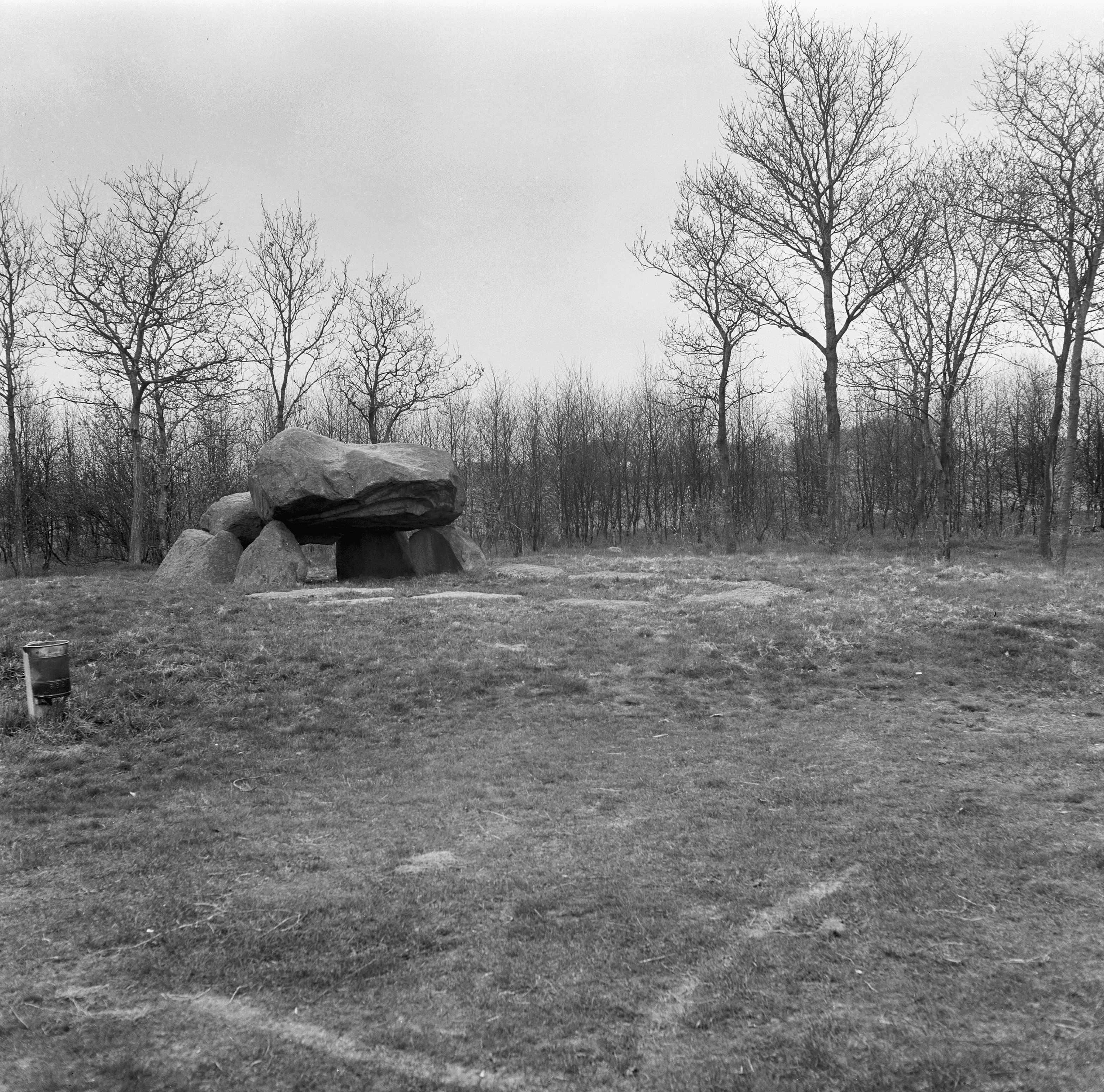 Hunebed G1 Noordlaren Groningen (NL)